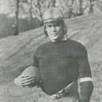 Tennessee Volunteers end Graham Vowell circa. 1922